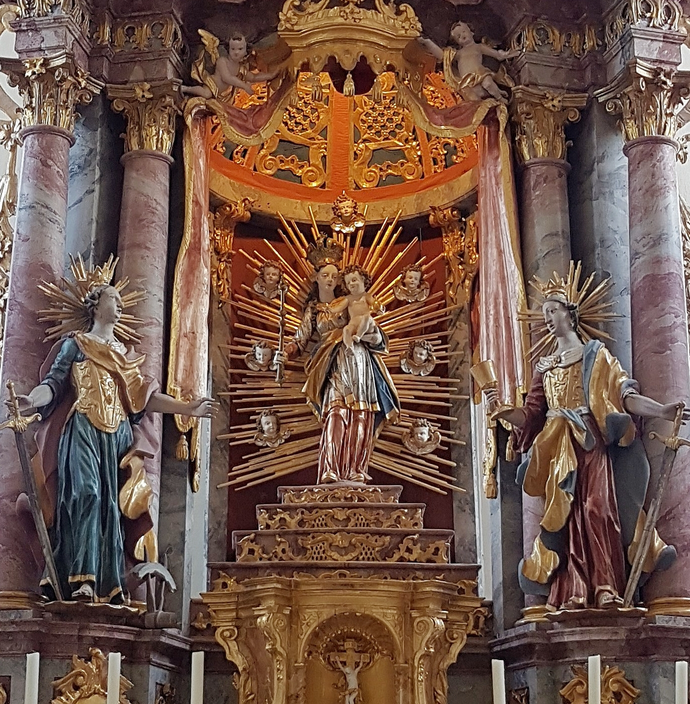 Maria Himmelfahrt (Kirchhof), Mittelschrein und Assistenzfiguren des Hochaltars